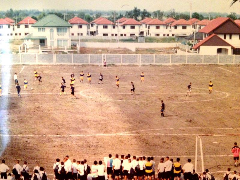 สนามฟุตบอล ในสมัยแรก